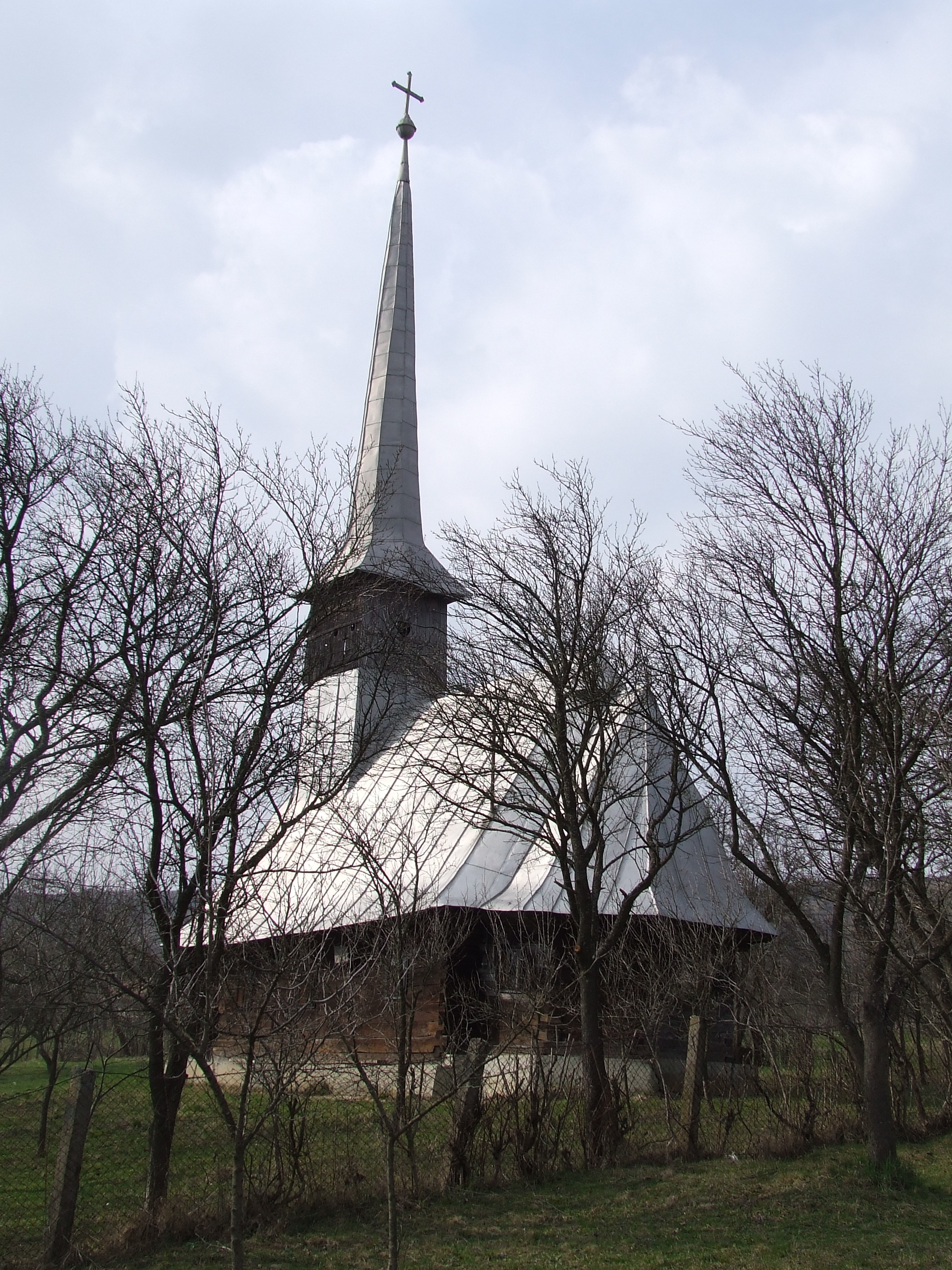 Biserica de lemn din Poieniţa, judeţul Sălaj. Autor: Bogdan Ilieş Data: martie 2007